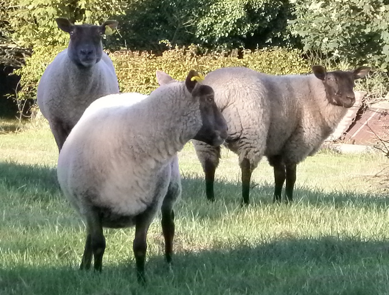 Moutons Roussins de la Hague dans un champ, Digulleville, Manche, France. OLYMPUS DIGITAL CAMERA